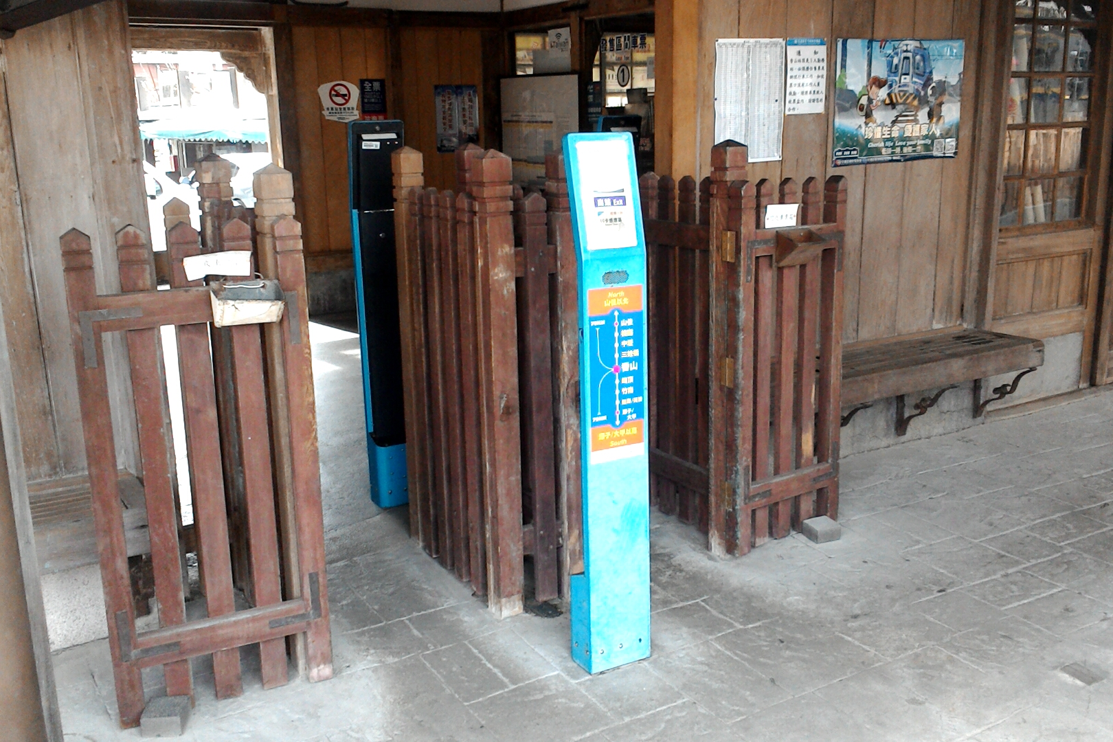 台鐵香山車站剪票口,台灣省新竹市香山區香山聯里朝山里